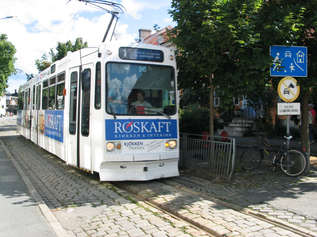 Tram in Trondheim